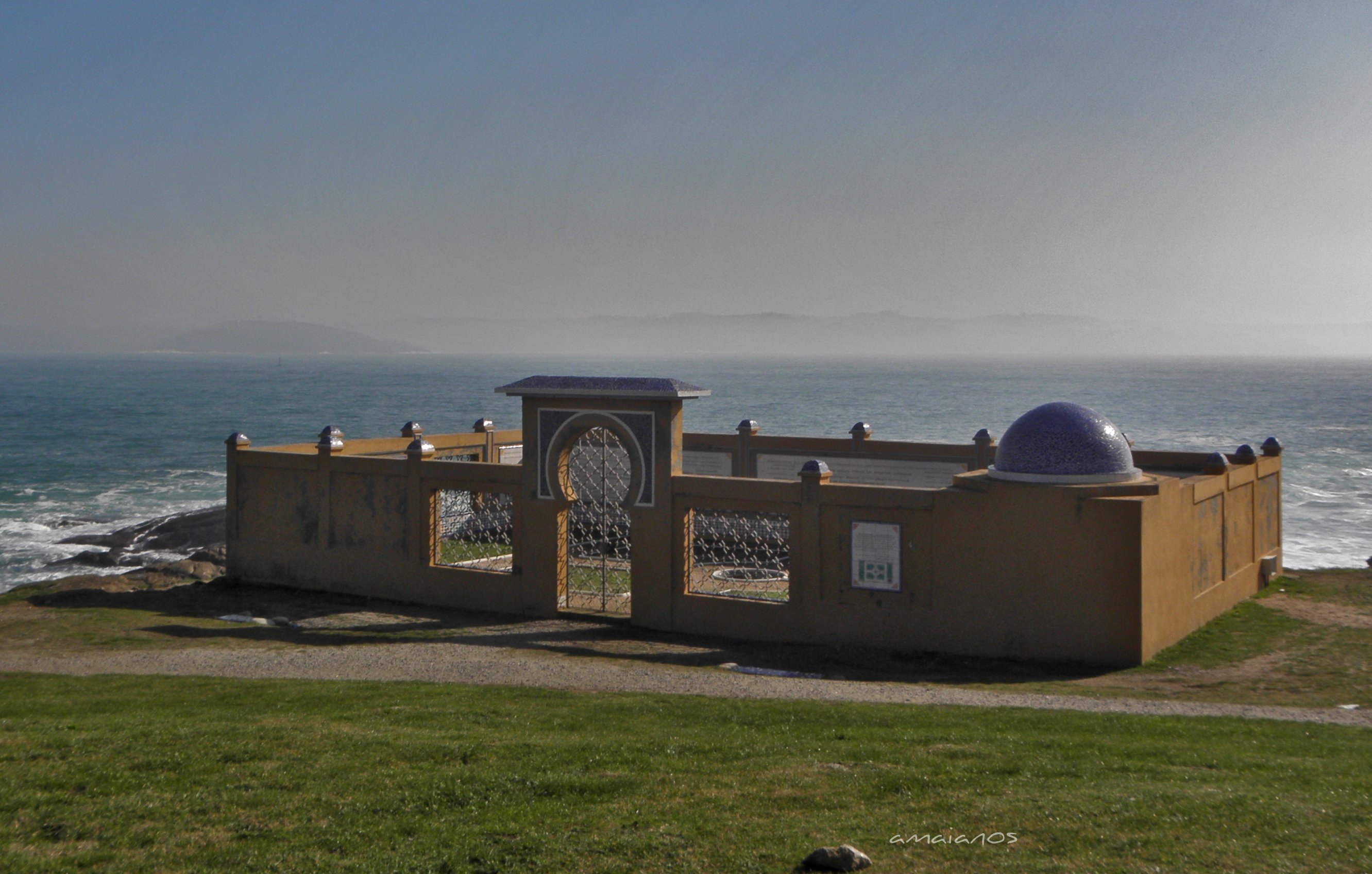 Casa de las Palabras (A Coruña). A unos cientos de metros de la Torre de Hércules de A Coruña, en el area conocida como Parque de Punta Herminia, se encuentra el antiguo "Cementerio Moro", un recinto donde fueron enterrados los combatientes franquistas de religión musulmana durante la Guerra Civil.